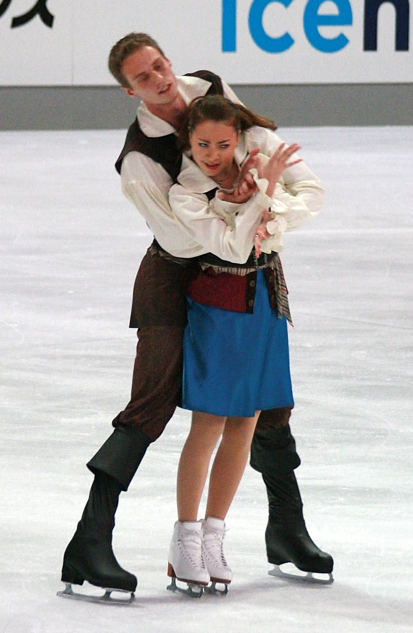 Эллисон Рид и Василий Рогов (Израиль) на 2013 Nebelhorn Trophy